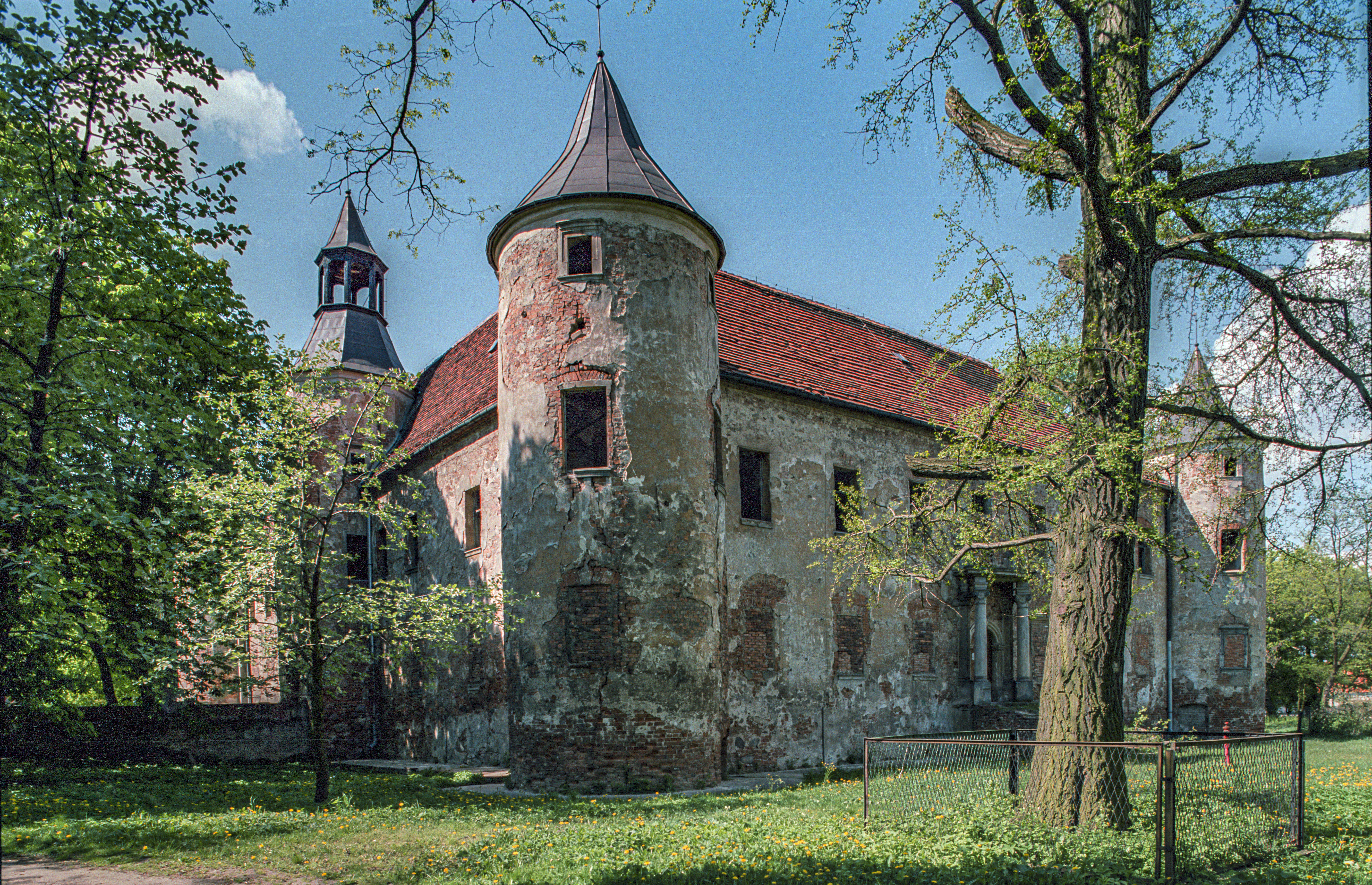 Chobienia